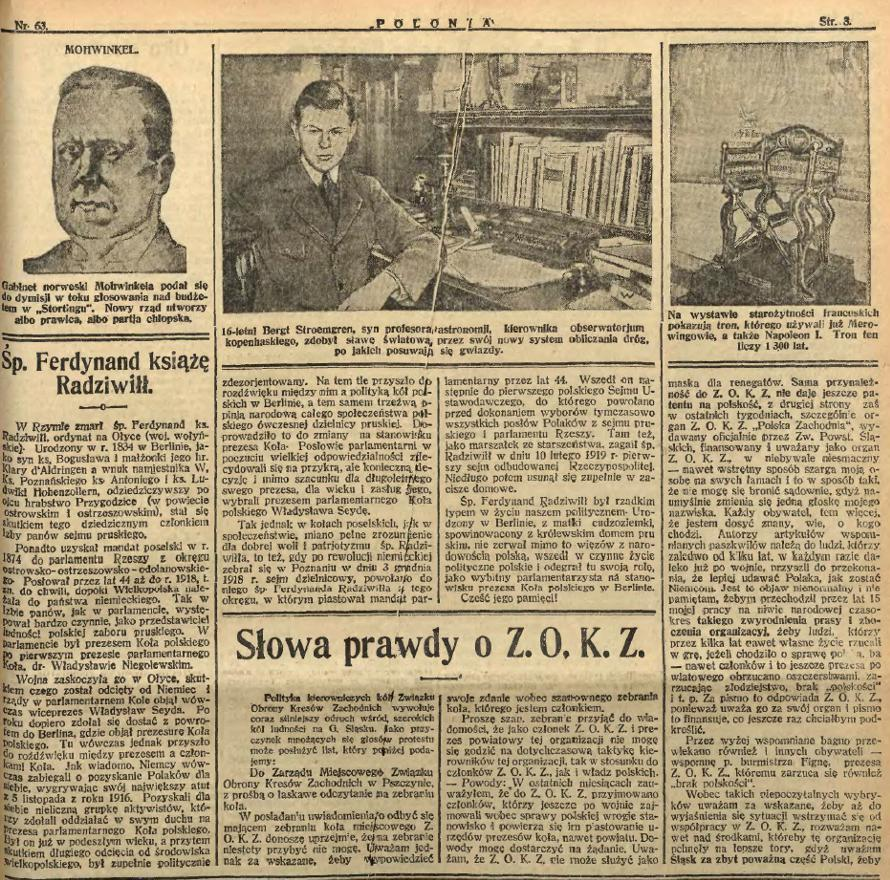 Stanisław Krzyżowski, Słowa prawdy o ZOKZ, „Polonia” z 4 marca 1926, nr 63, s. 3